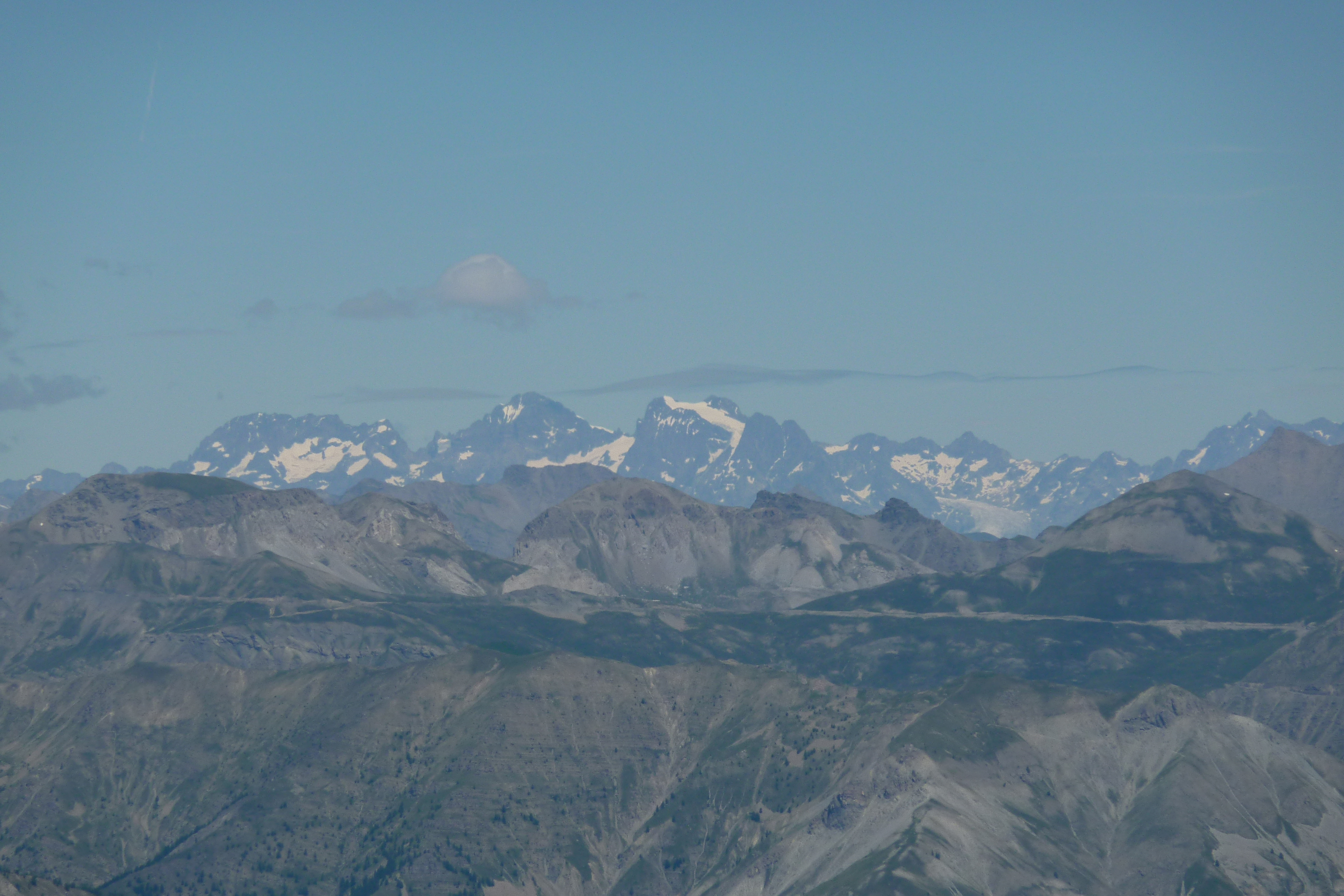 Du Mont-Mounier (2817 m) - 06 FRANCE - vers le Nord, vue sur le Massif du Pelvoux et la Barre des Ecrins (4012 m)